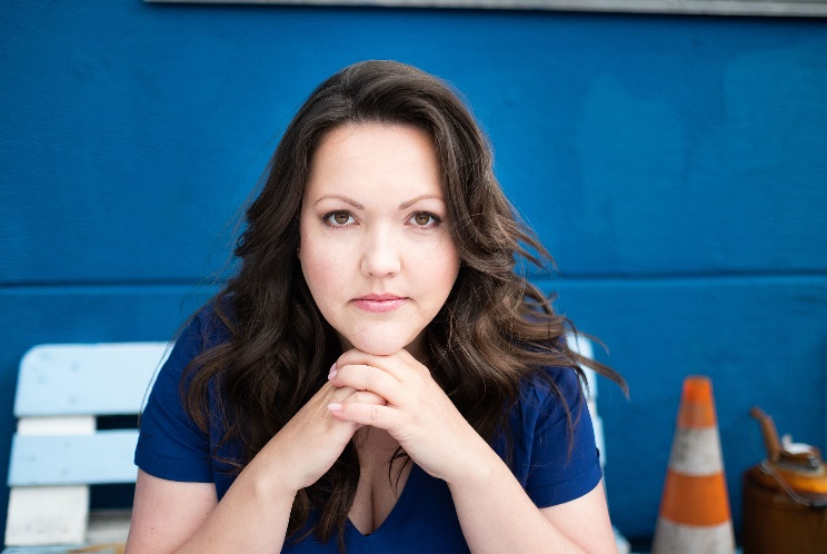 Sarah Victoria Schalow - Photo by Stephan Behrens (Köln, Mai 2019)